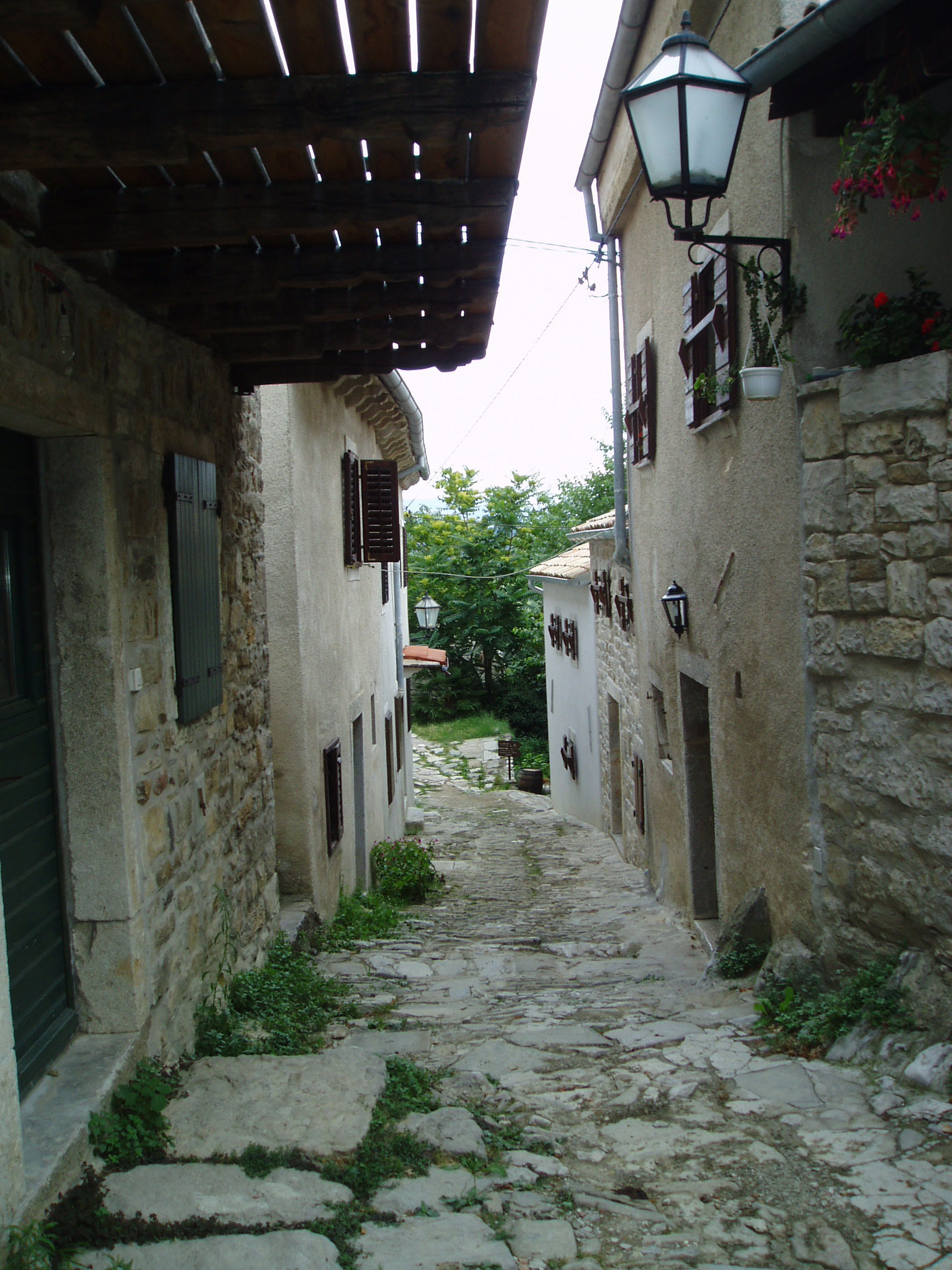 Hum